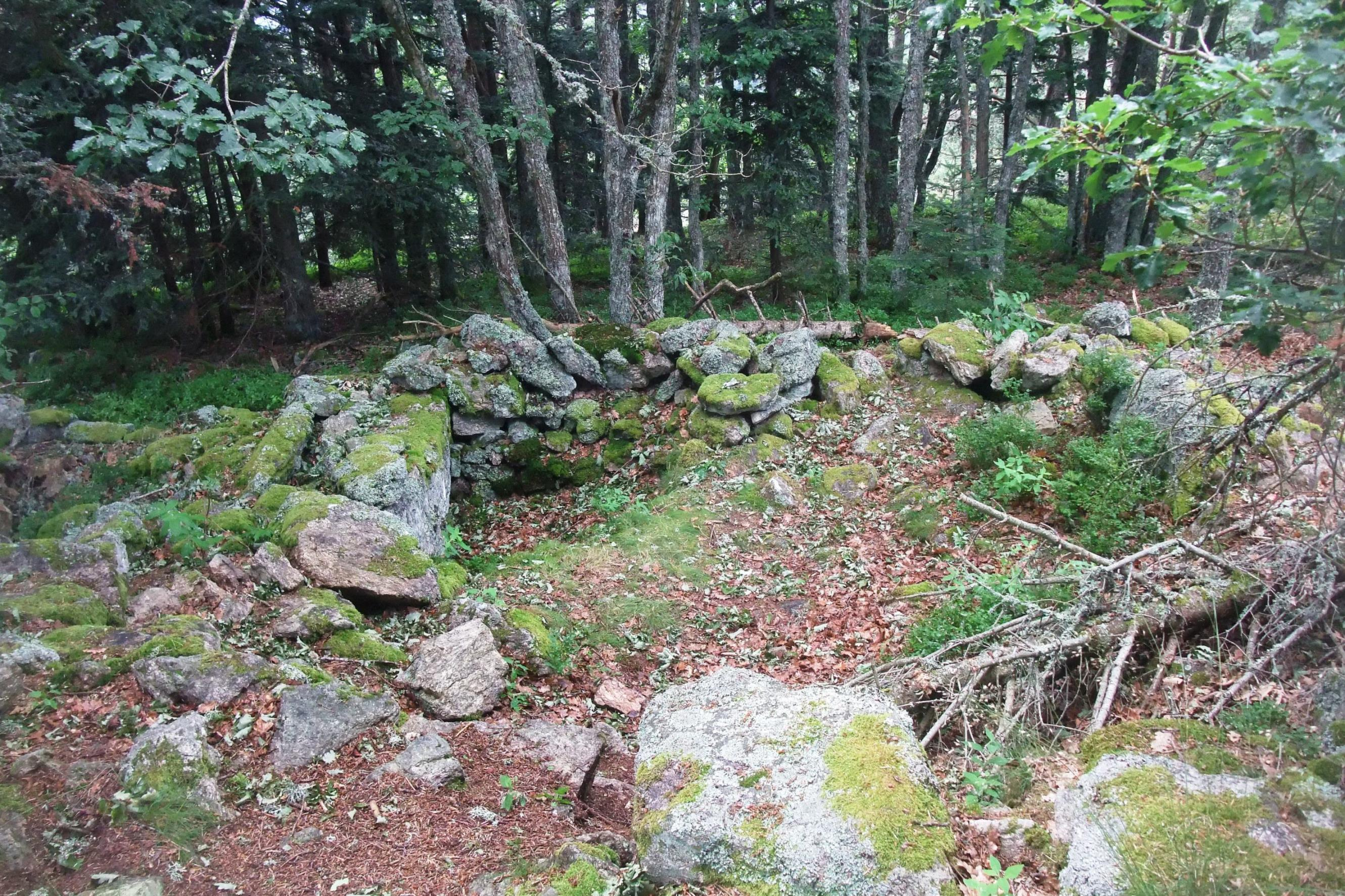 Vocance cabane gauloise au Chirat blanc